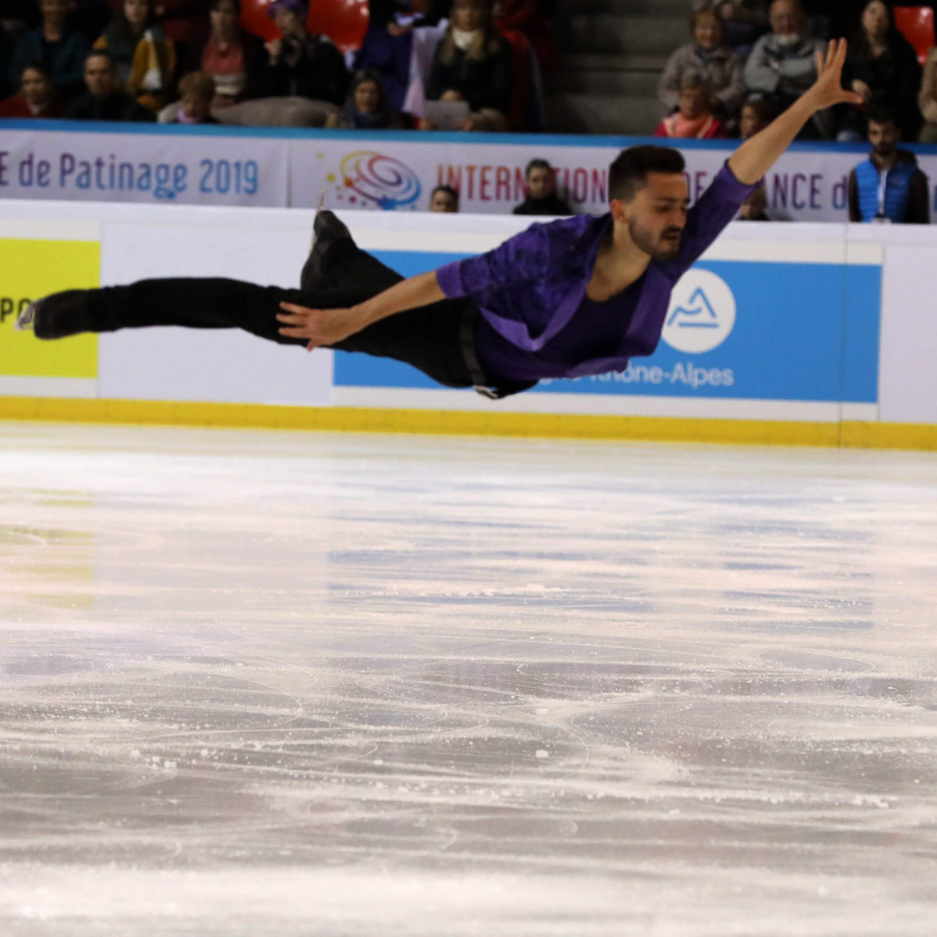 Kevin Aymoz, programme court aux Internationaux de France 2019.